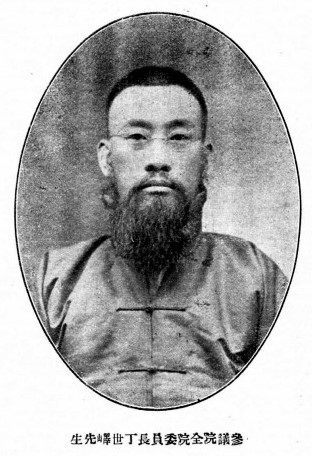 丁世嶧肖像